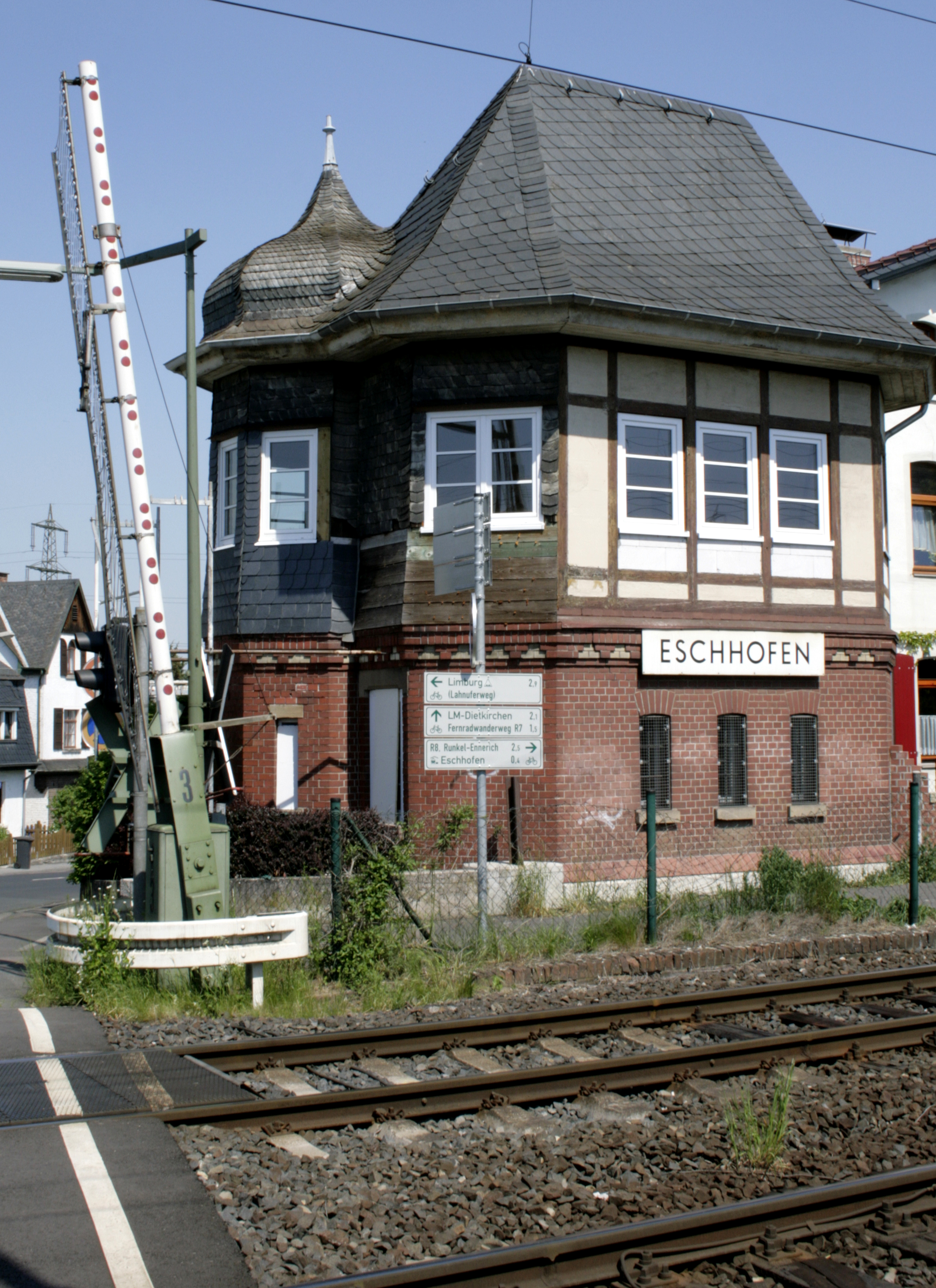 Denkmalgeschütztes Schrankenwärterhäuschen in Eschhofen, Deutschland